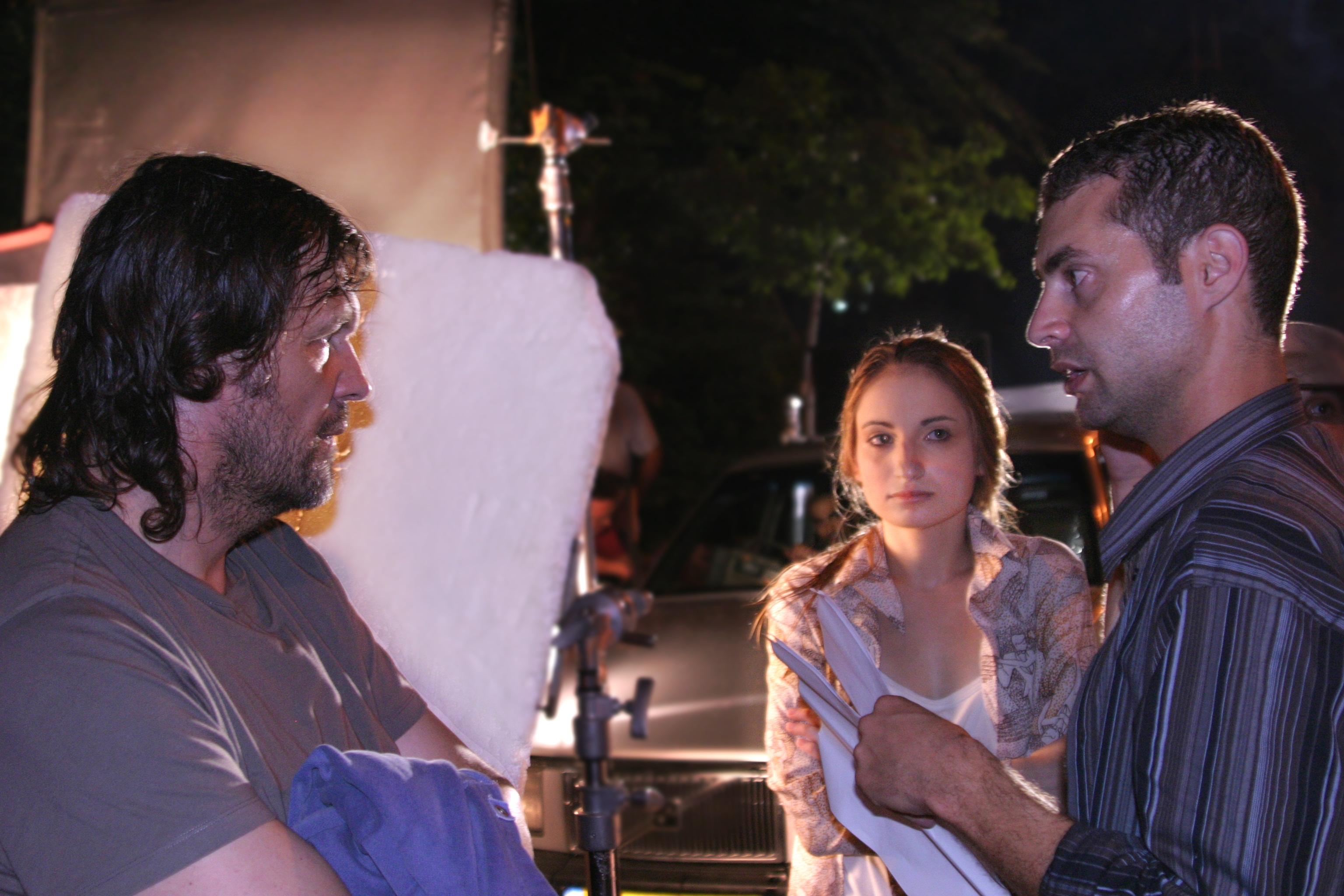 איל סיבי, הילה מצקר-הלוי ואמיר קוסטוריצה, בסרטו של איל סיבי "חלום קוסטוריצה", 2013